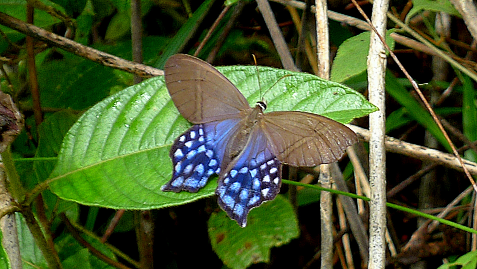 Pierella lena (Linnaeus, 1767)